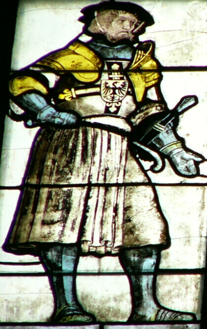 Ausschnitt aus dem Markgrafenfenster von St. Sebald in Nürnberg: Herzog Albrecht von Preußen